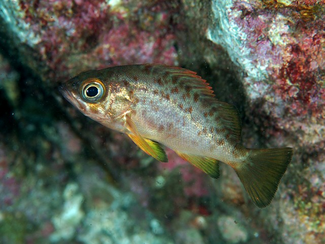 メバル Sebastes inermis